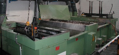 Brünieranlage